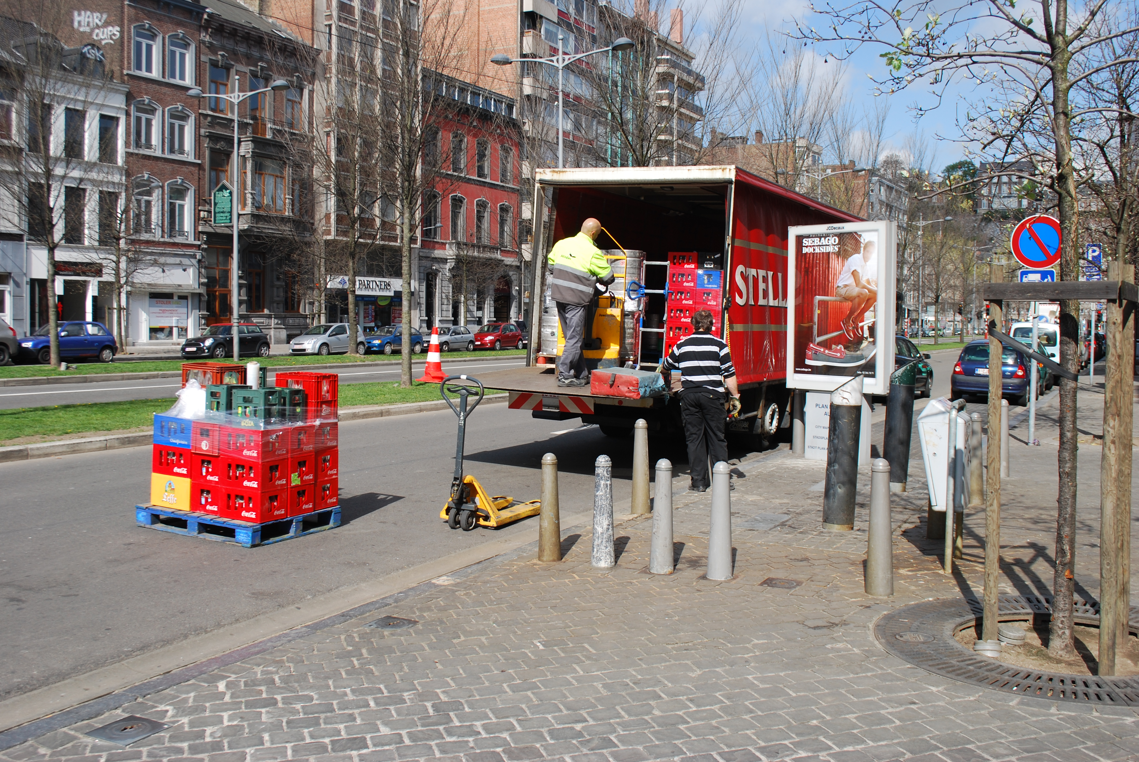 Vue du boulevard de la Sauvenière à Liège.